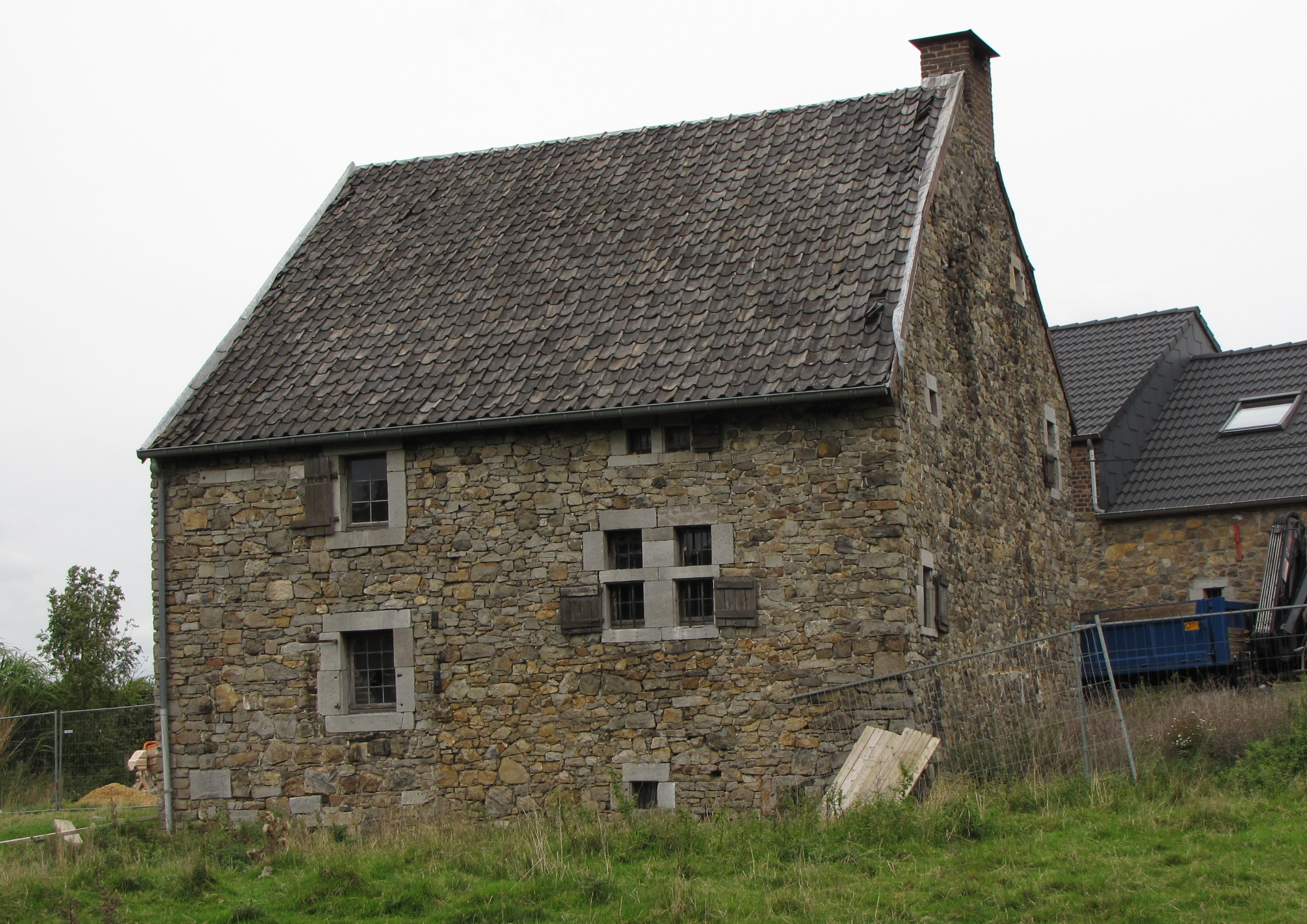 Vieille bâtisse dans le village de Crawhez (entité de Thimister-Clermont.